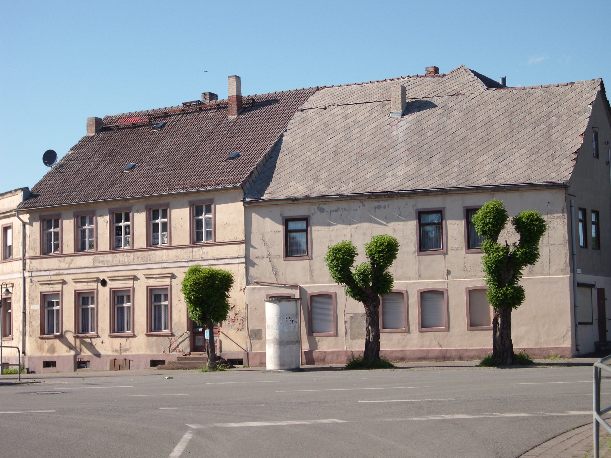 Ehemaliges Gaststättengebäude aus dem 19. Jahrhundert. Heute Wohnhaus.